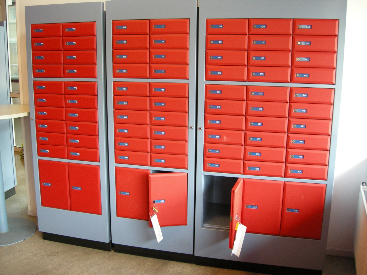 Postbussen in het TNT businesspunt in Elst